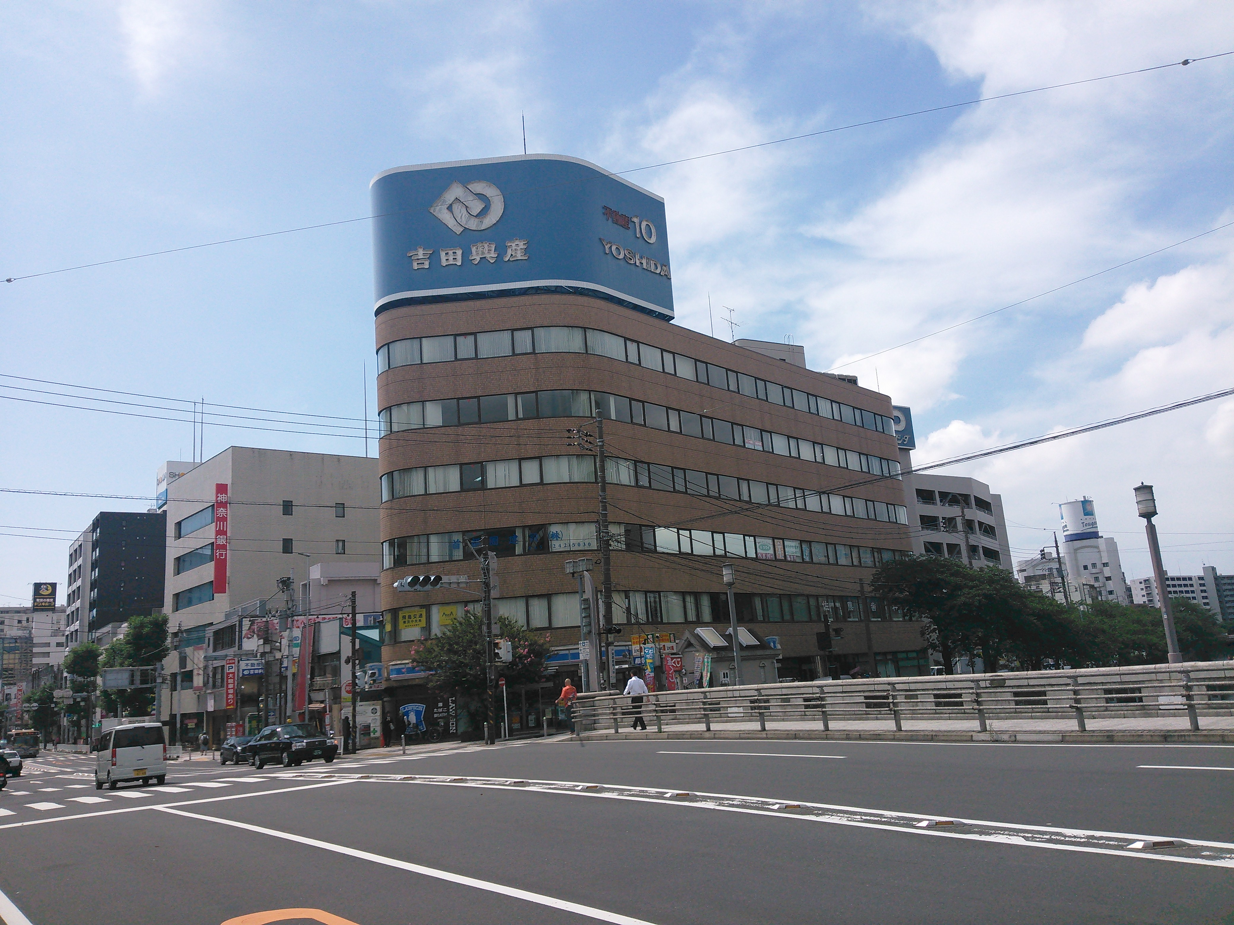 横浜市中区長者町の第10吉田ビル。吉田新田開拓者の末裔が経営する吉田興産の所有である。